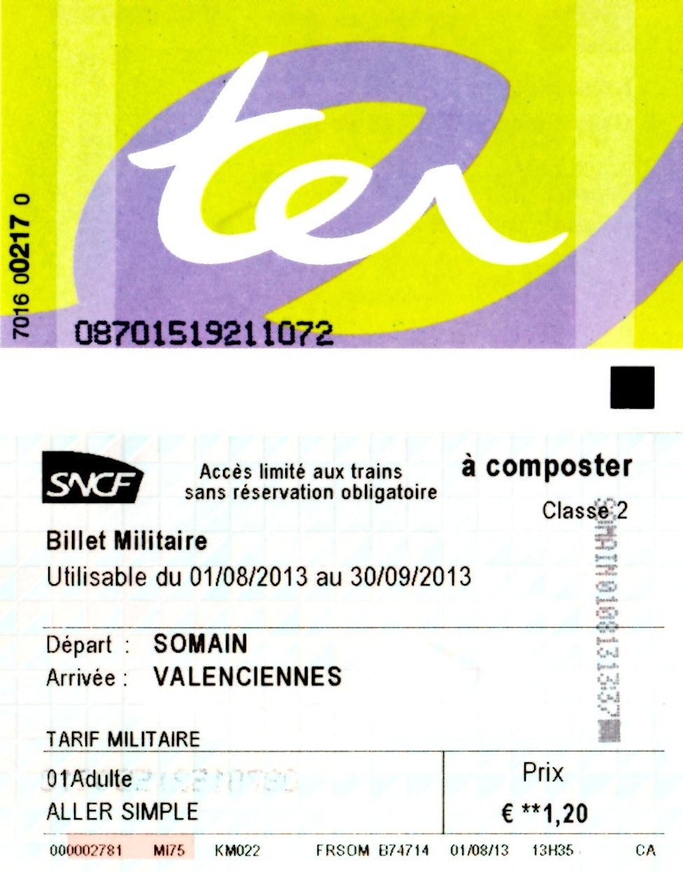 Exemple d'un billet de train (recto et verso) utilisé en 2013 pour le TER Nord-Pas-de-Calais.